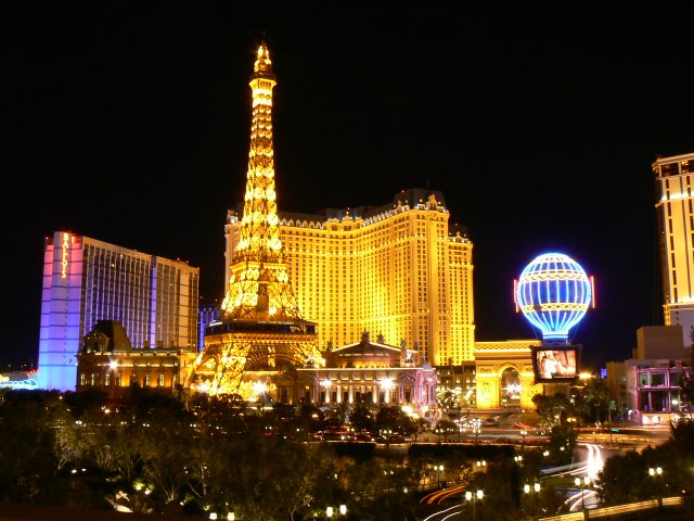 Hotel Paris noca w Las Vegas